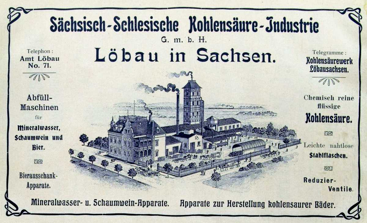 Sächsisch-Schlesische Kohlensäure-Industrie, G.m.b.H, Löbau in Sachsen (Abbildung aus dem Jahr 1906)